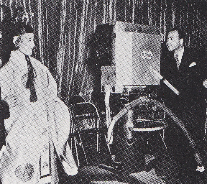 NBCでテレビ収録中の水の江瀧子